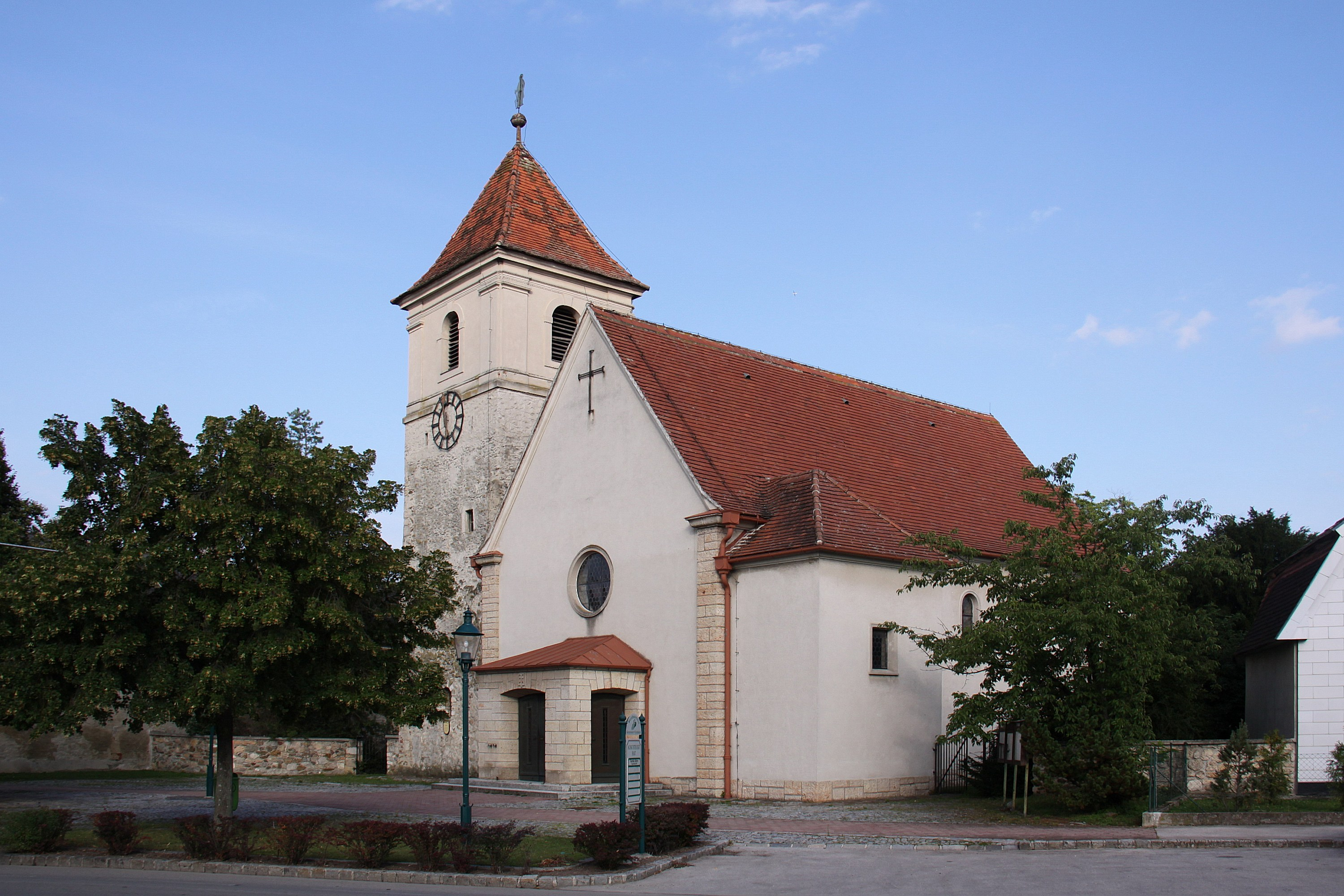 Denkmalgeschützte Filialkirche hl. Laurenz in Katzelsdorf. Object location47° 46′ 46.13″ N, 16° 16′ 11.6″ E